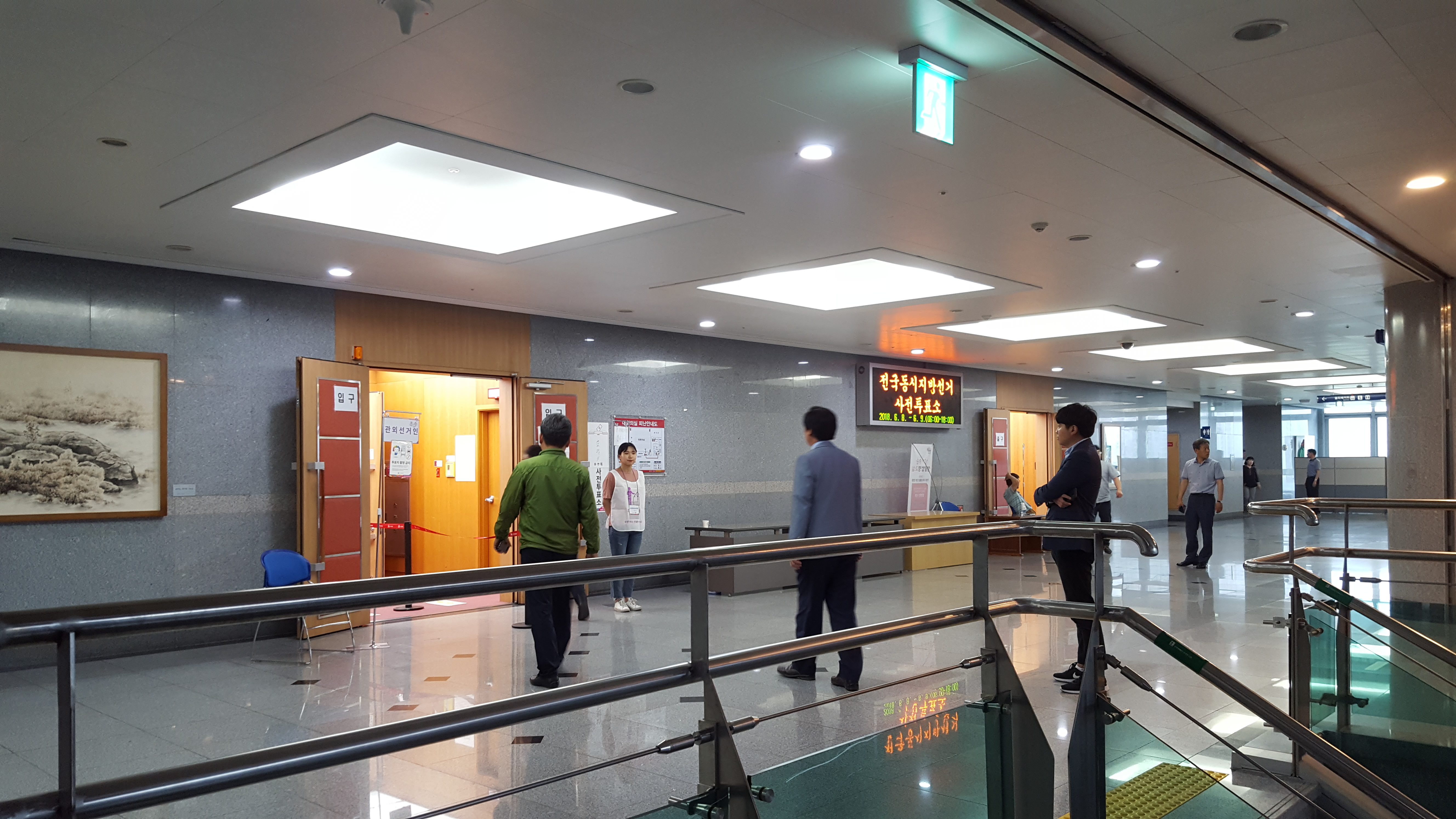 전라북도청 4층 대회의실에 설치된 효자4동사전투표소으로 사전투표하러가는 이광석 전라북도지사 후보.